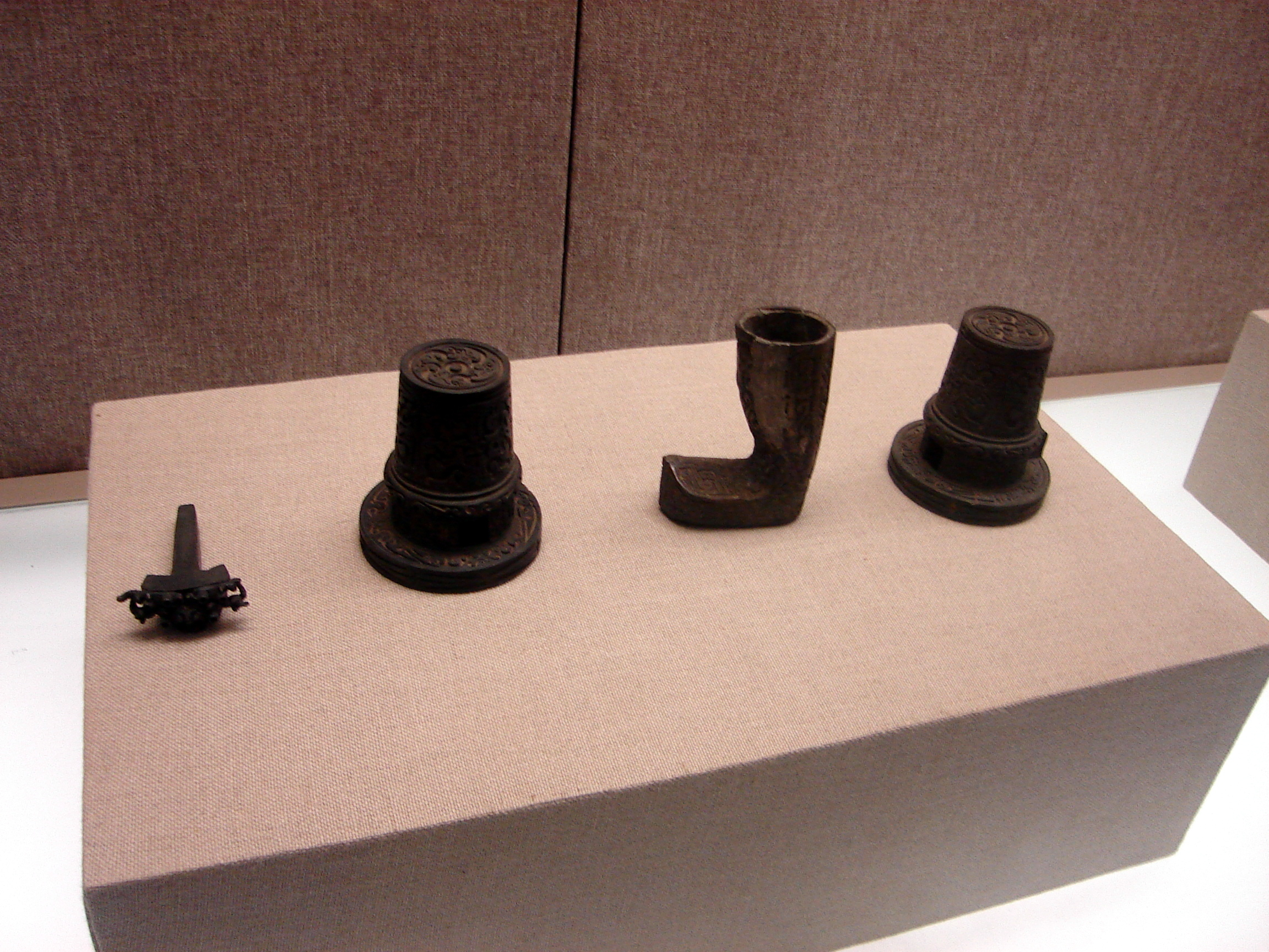 侯古堆一号墓出土车马饰，现藏于信阳博物馆。